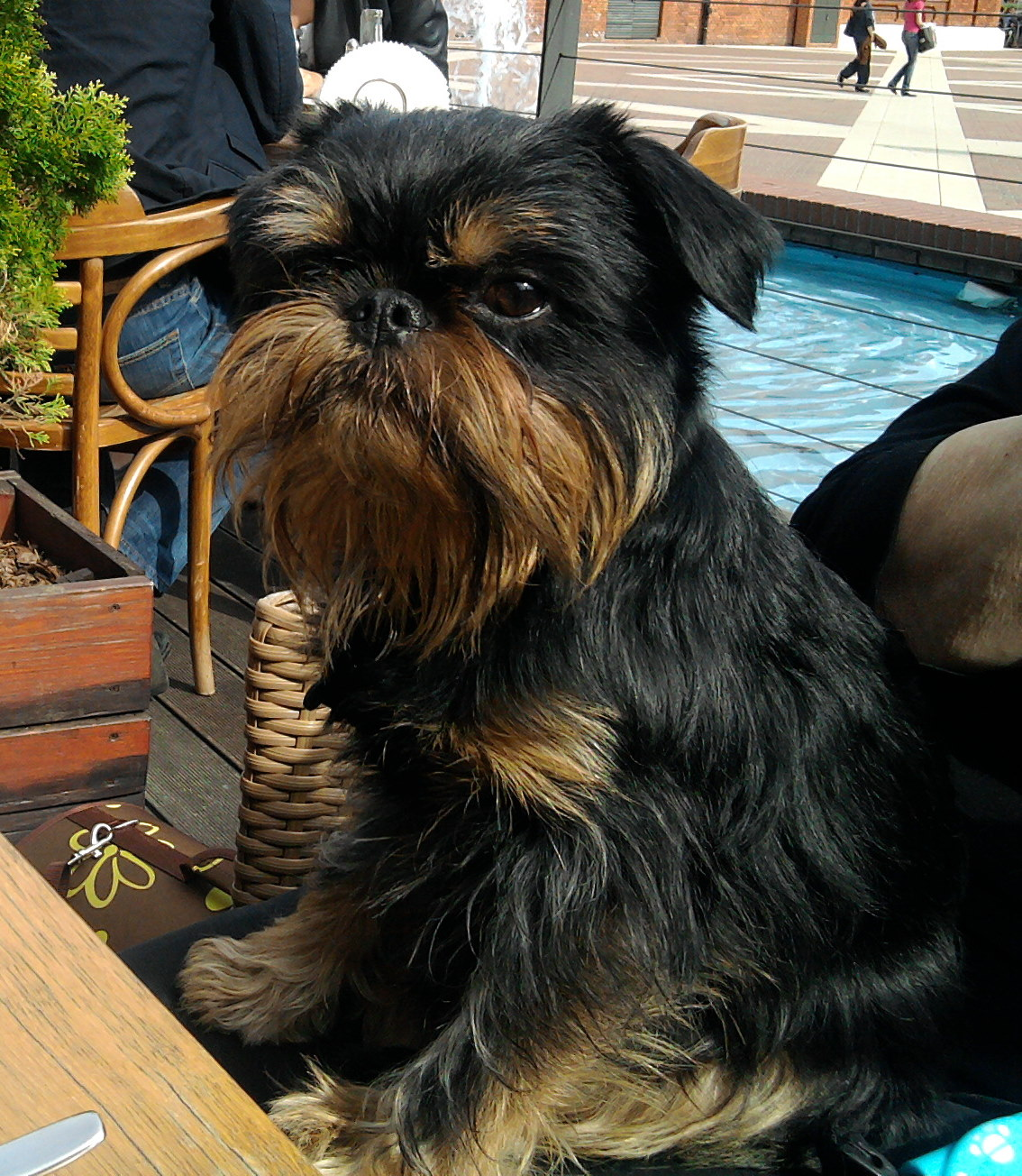 Wasyl Duma Bojarów - gryfonik belgijski, reproduktor hodowli Griffon Hof - Warszawskie Gryfoniki